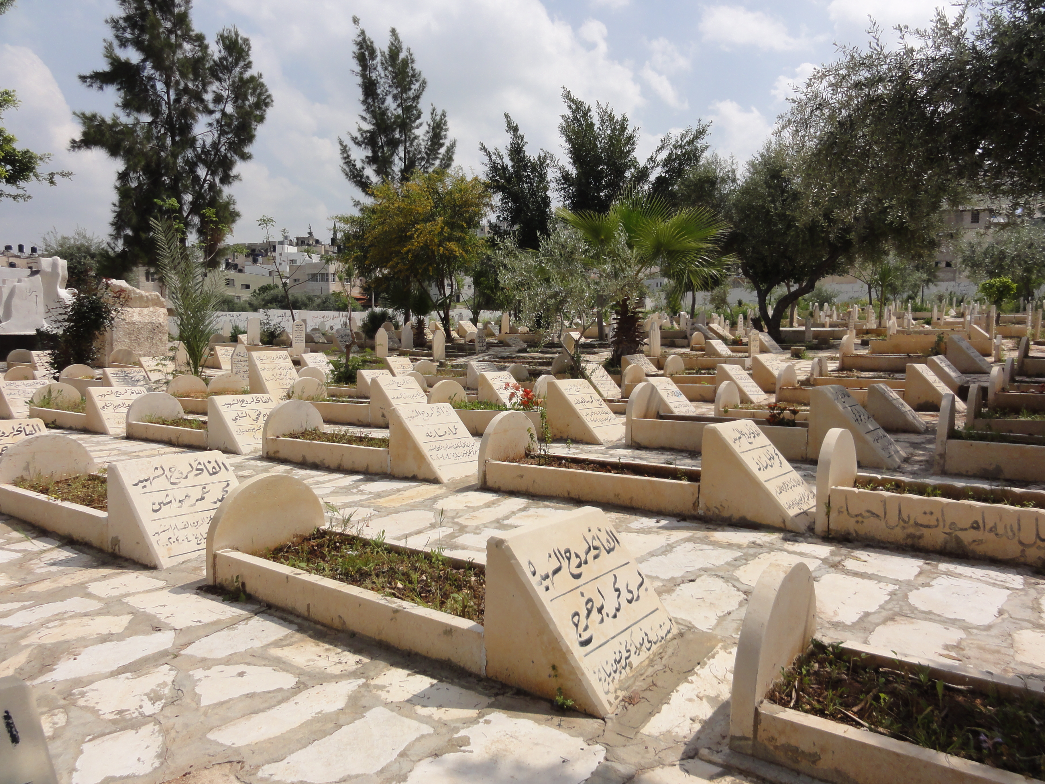 Jenin RC